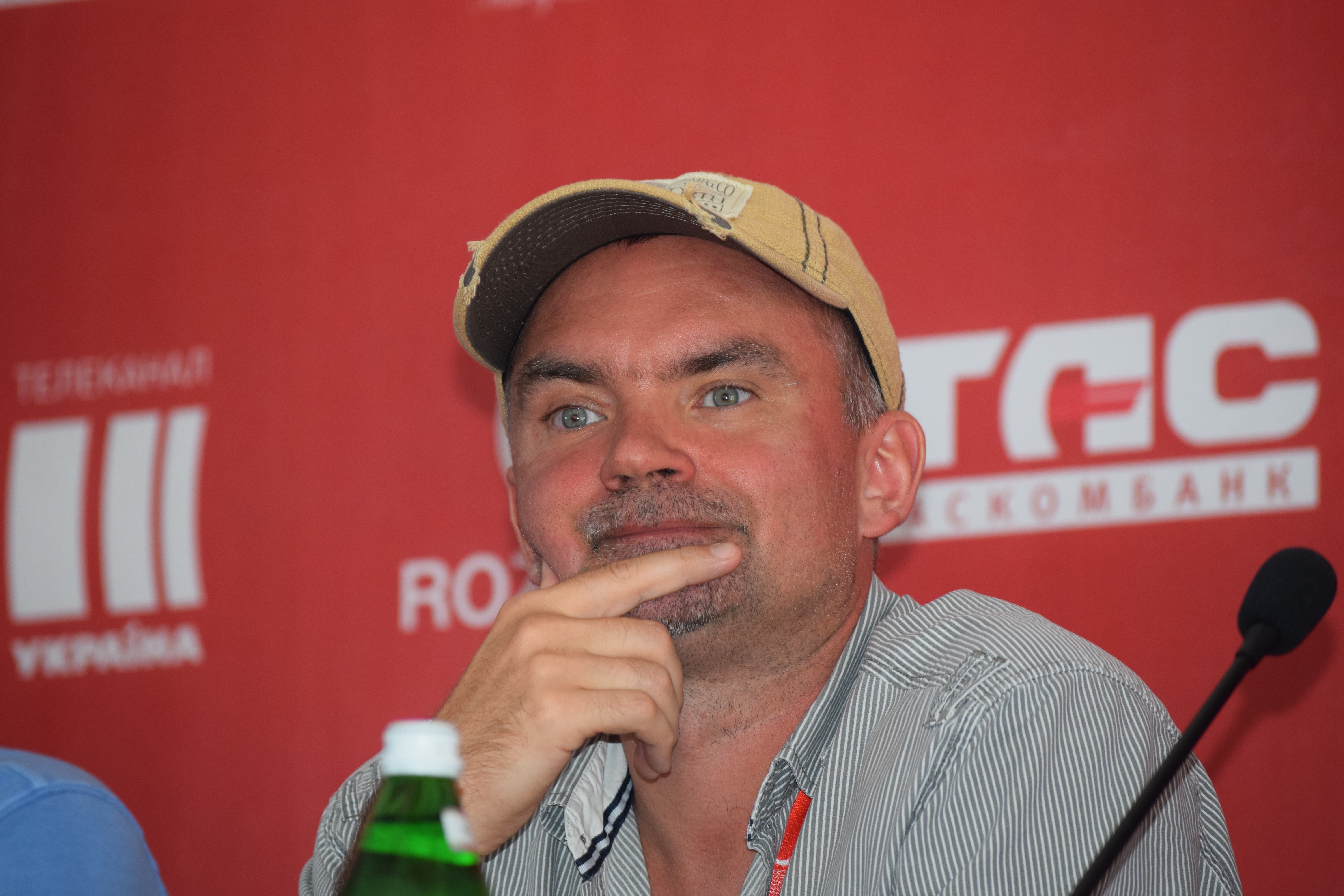 Пшемыслав Новаковски на 7-м Одесском международном кинофестивале.